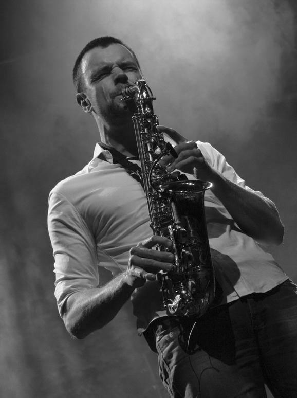 Felix Falk auf dem St. Ingberter Jazzfestival